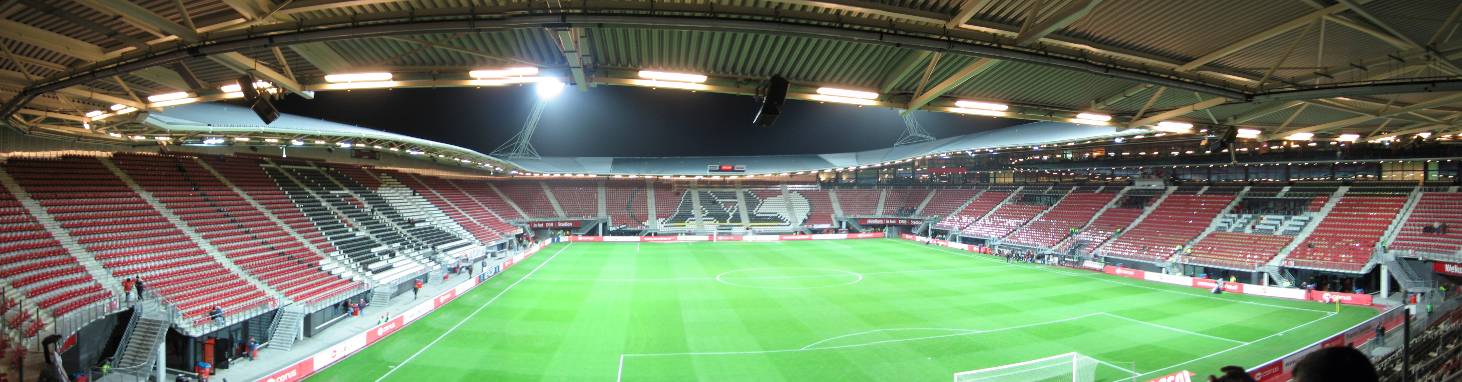 Wide View of AZ Alkmaar Stadium